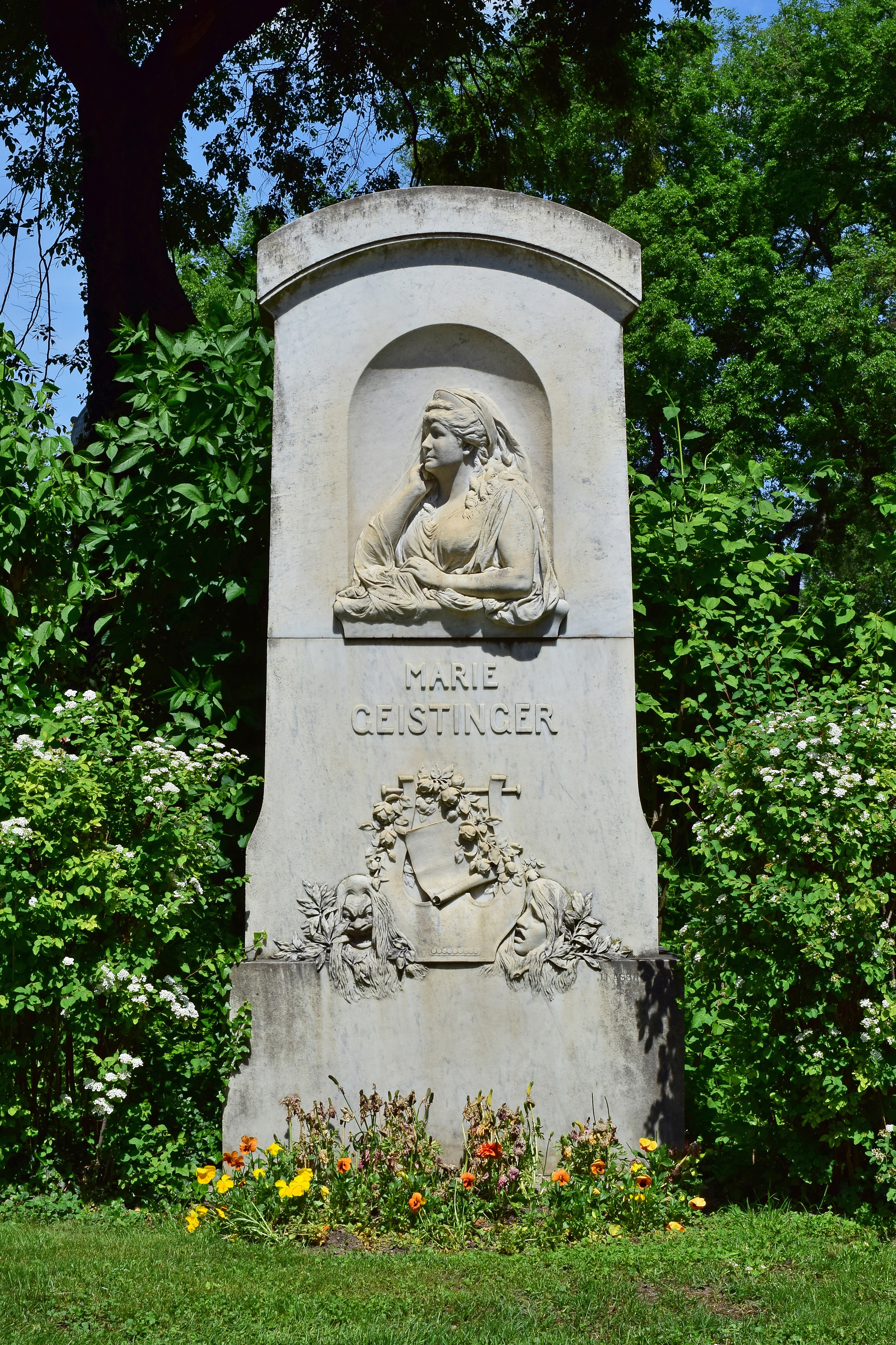 Ehrengrab von Marie Geistinger auf dem Wiener Zentralfriedhof, geschaffen von Josef Valentin Kassin.